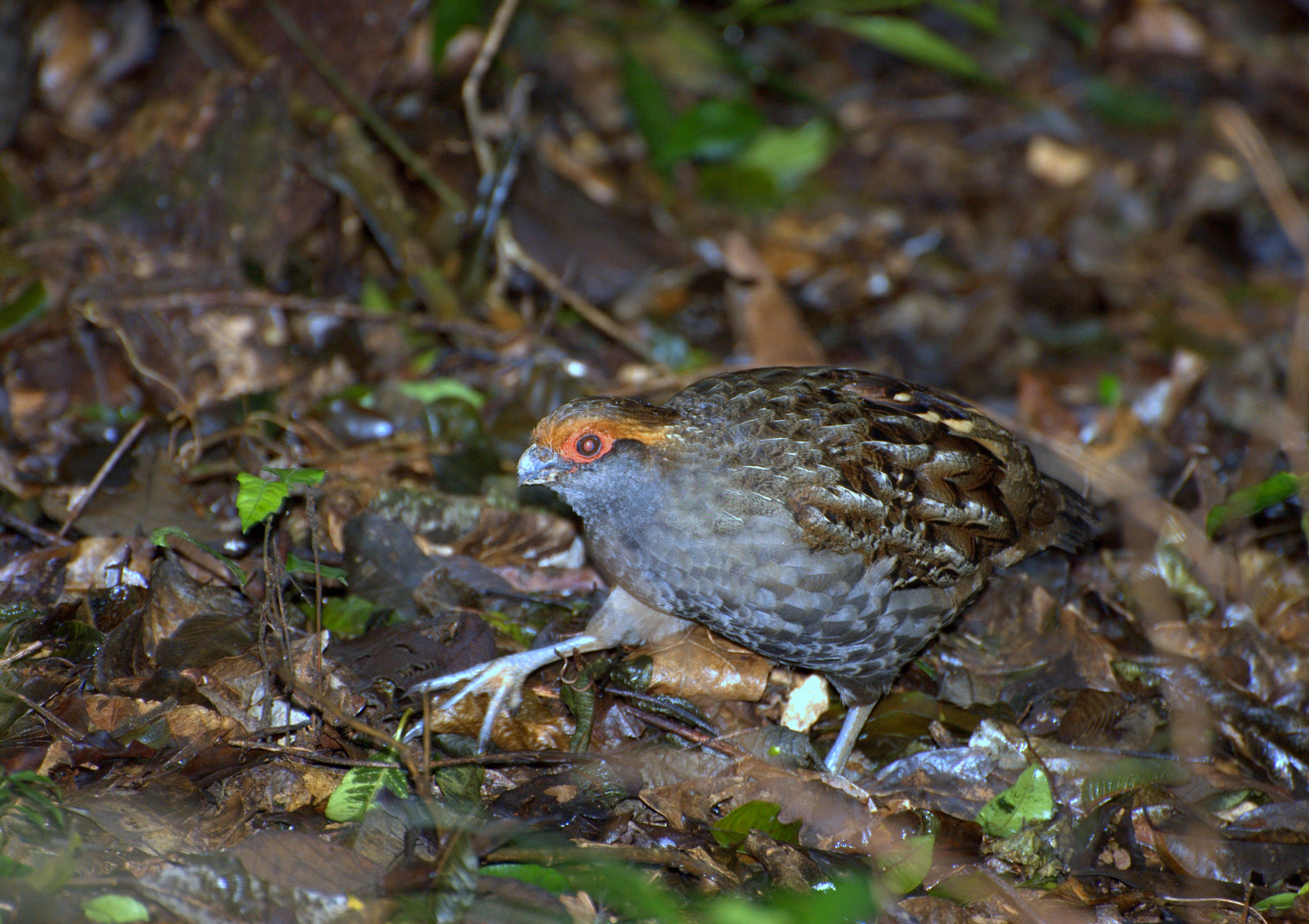 Spot-winged Wood-quail (Odontophorus capueira) Parque Estadual da Serra da Cantareira - São Paulo - Capital - Brasil Pequena ave terrícola de com bico alto e curvo, mandíbulas serrilhadas, pernas curtas e robustas, dedos grossos, cauda farta, porém curta. A característica da espécie é a existência de um penacho sempre na vertical e localizado no topo da cabeça. Anda em grupos pelo solo de matas e capoeiras sombrias. Cisca à vontade no chão comendo pequenos artrópodes, moluscos, bagas e sementes. Quando ameaçado prefere escapar correndo do que voar e conforme a situação deita-se no solo para se esconder. Quando posam juntinhos esquentam-se e arrumam mutuamente as penas. É uma ave que cai com facilidade em arapucas. Ocorre do Ceará ao Rio Grande do Sul e sudoeste de Mato Grosso. Fonte: Renctas